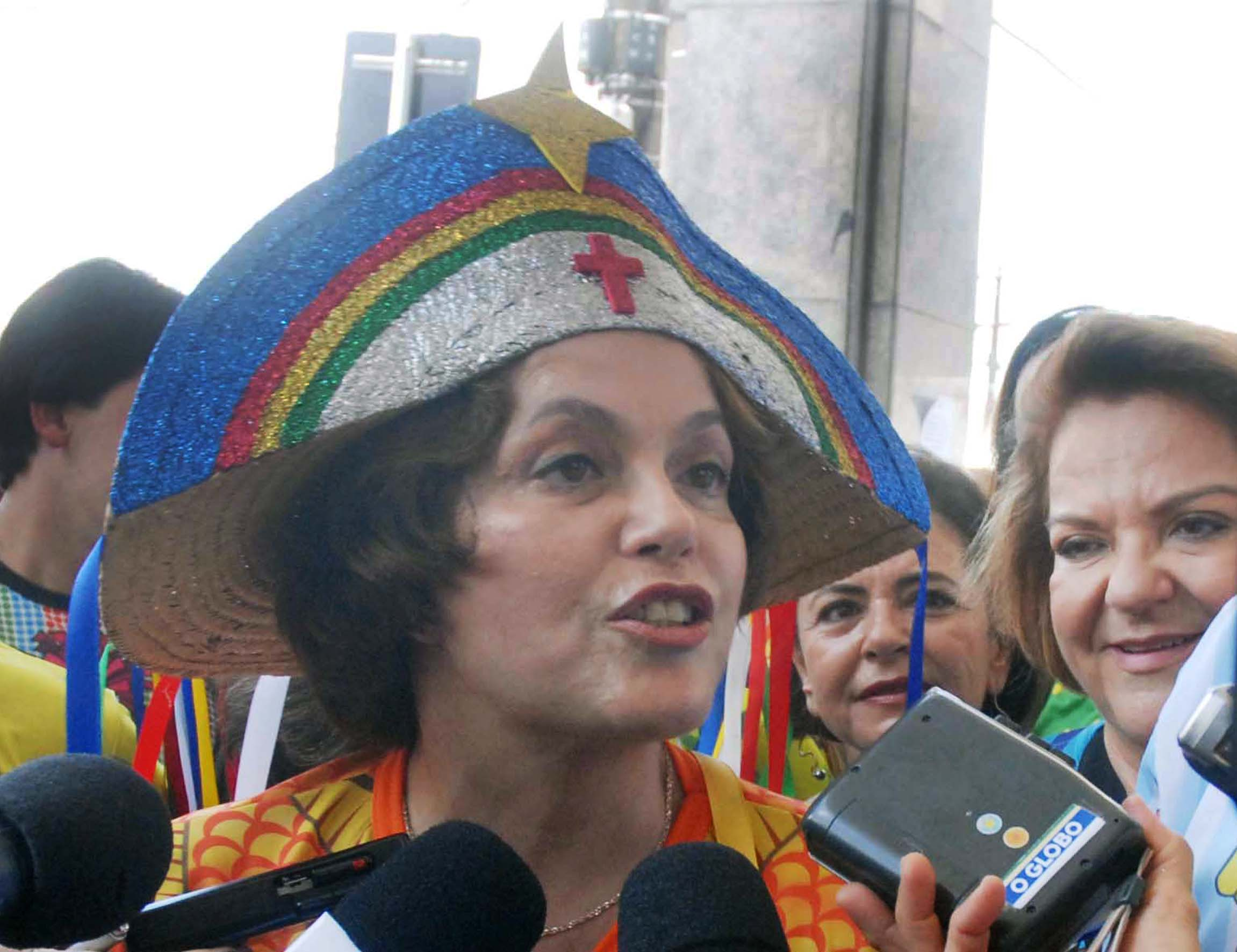 Recife - A ministra da Casa Civil, Dilma Rousseff, fala à imprensa, durante o desfile do bloco Galo da Madrugada, no camarote do governador de Pernambuco, Eduardo Campos.